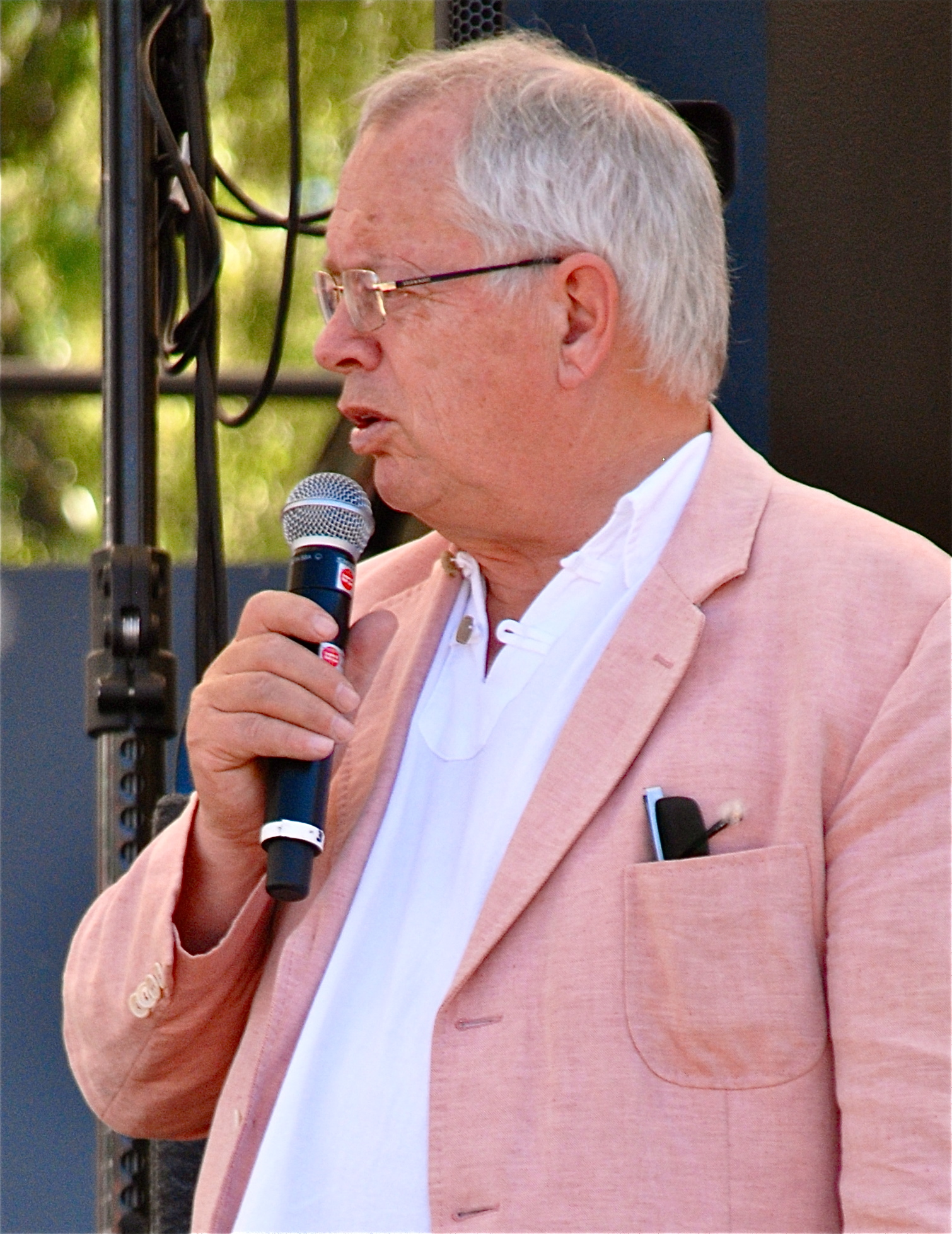 Staffan Ling i Kungsträdgården 3 juni 2011.